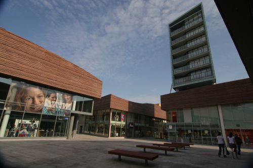 Deel van het nieuwe stadscentrum, Almere, met woontoren "'t Kanteel" dat voor uitstel zorgde.